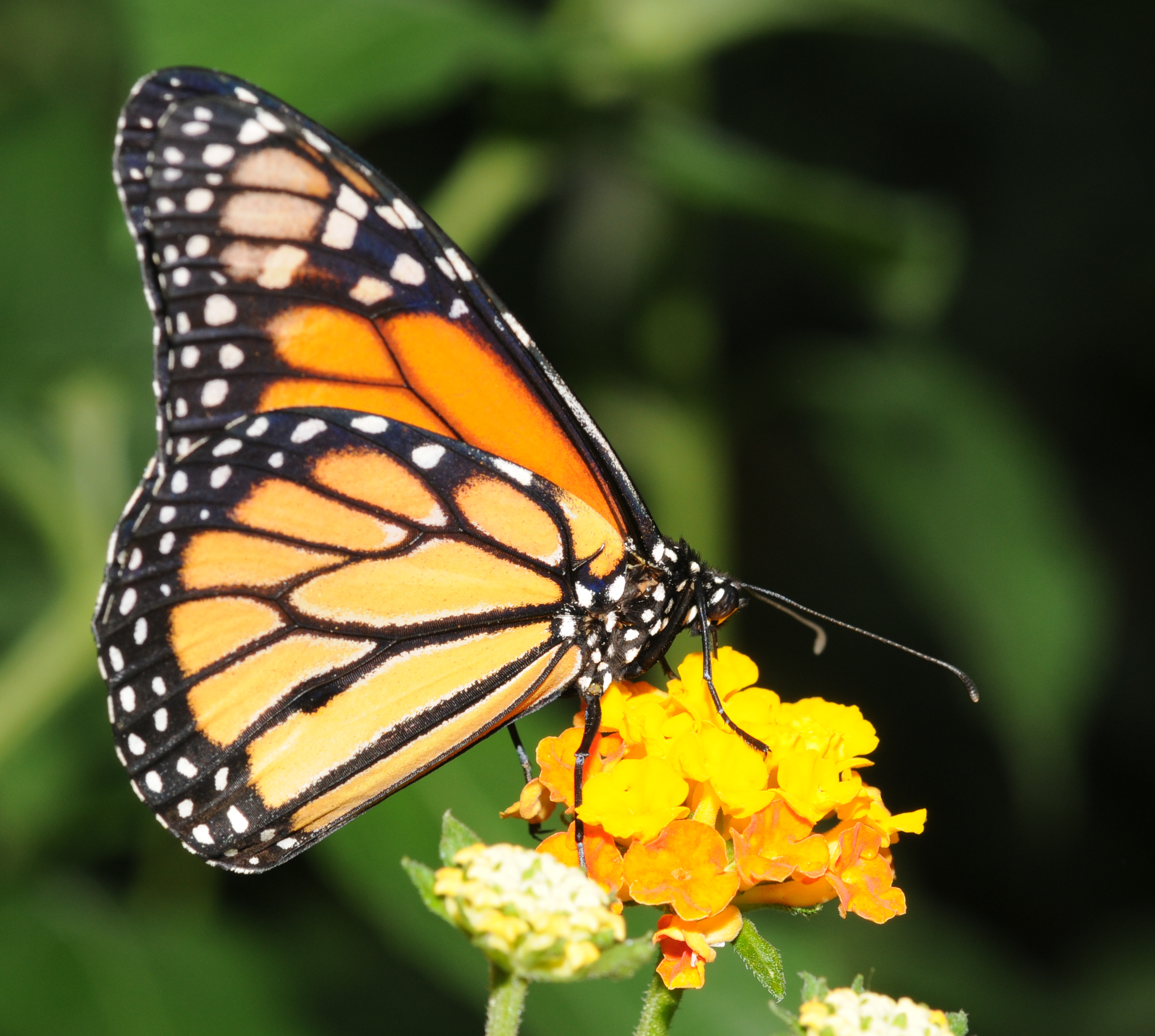 Monarque. Jardin des papillons, Hunawihr.